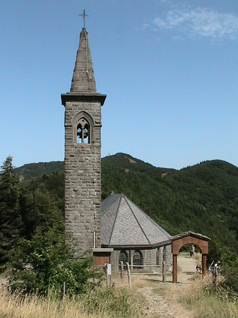 BERCETO - Passo della Cisa - Santuario di Nostra Signora della Guardia